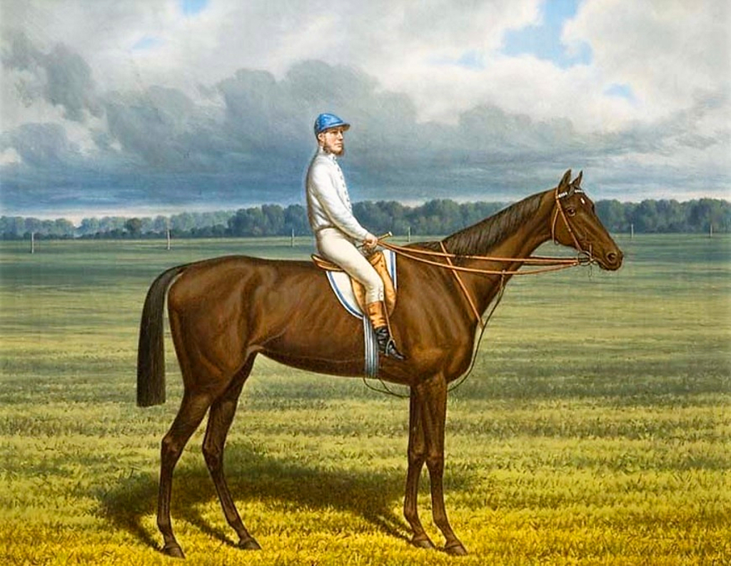 G. Siegert Rennpferd Kincsem mit Jockey col. Lithographie, in der Platte sign. und datiert 1880, auf dem Passepartout aufgedruckte Lebensdaten mit Besitzer, Trainer und Jockey, das berühmte Rennpferd Kincsem, (das „Ungarische Wunder”)wurde am 17. März 1874 im ungarischen Nationalgestüt Kisber geboren, Züchter und Besitzer war Ernö von Blaskovits, die Stute debütierte am 21. Juni 1876 in Berlin-Hoppegarten, sie trat in vier Jahren in 54 Rennen an und wurde nie besiegt, mit dieser Leistung triumphiert Kincsem noch heute über alle Vollblüter der Welt, sie ist und bleibt unerreicht, im Passepartout unter Glas in schmaler Holzleiste gerahmt, diese rest.bed., IM 40,5 x 35 cm.